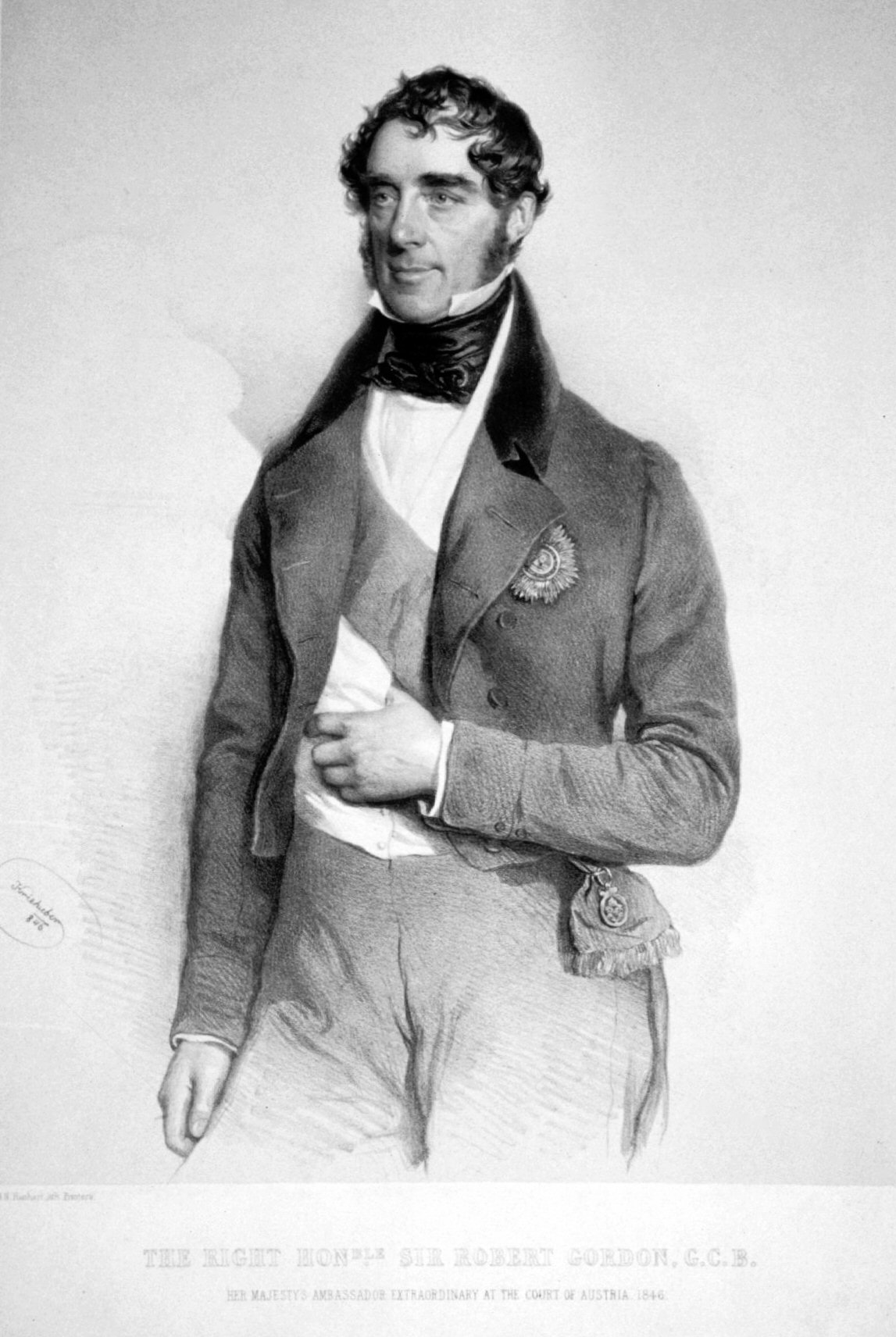 Sir Robert Gordon (1791-1847), englischer Diplomat. Lithographie von Josef Kriehuber, 1846